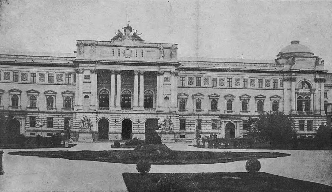 Sejm Krajowy Galicji (1905)